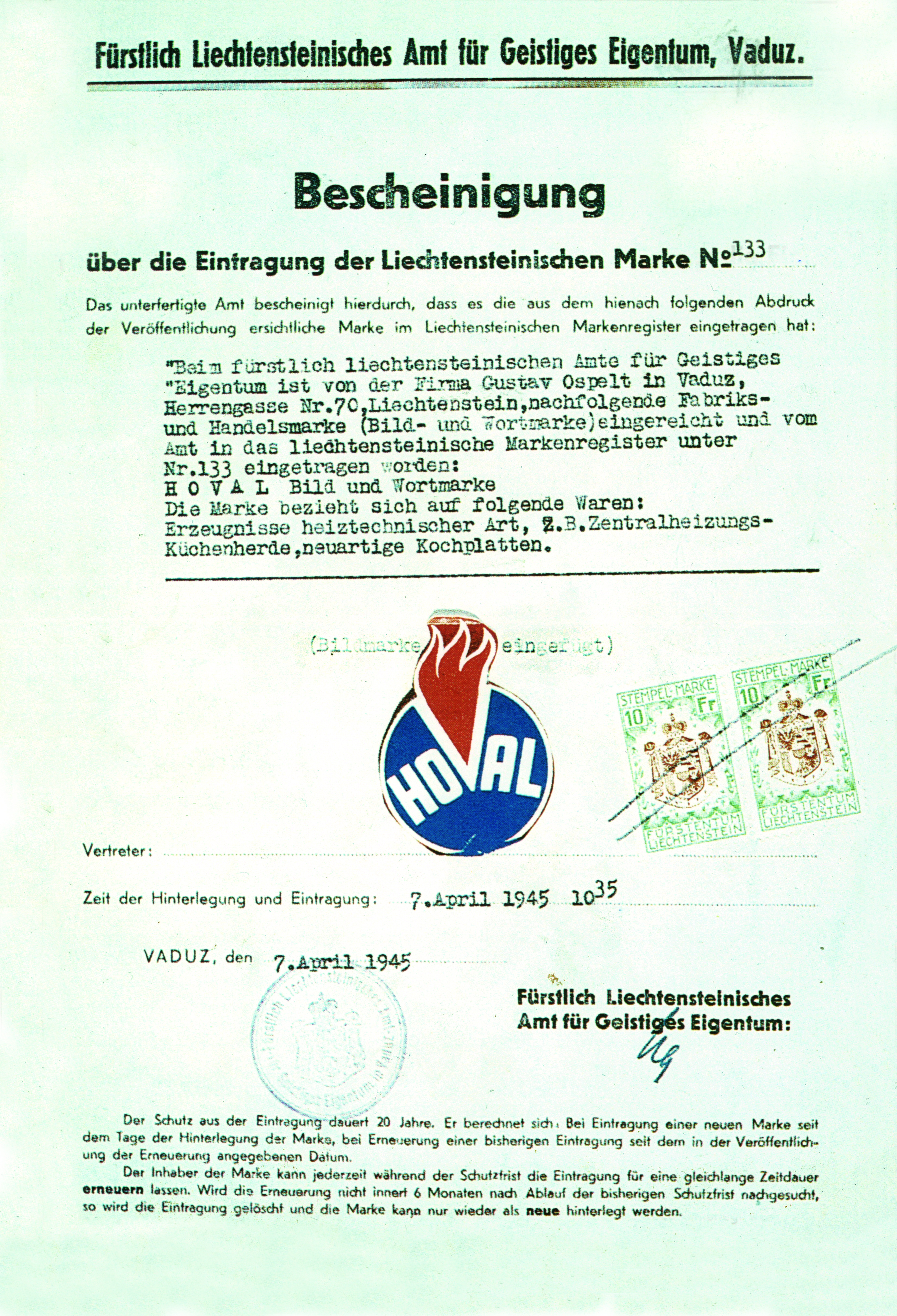 Hoval Markeneintragung 1945